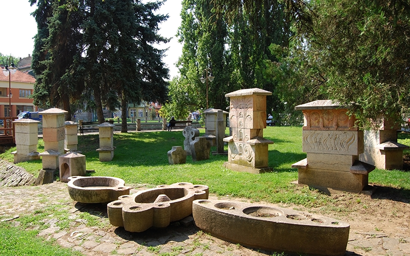 Spomen-park in Knjaževac